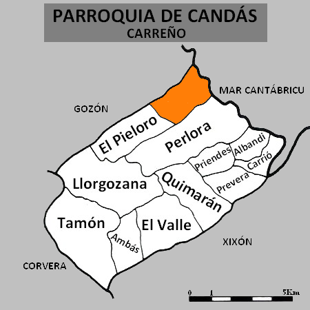 Situación de la parroquia de Candás, nel conceyu Carreño